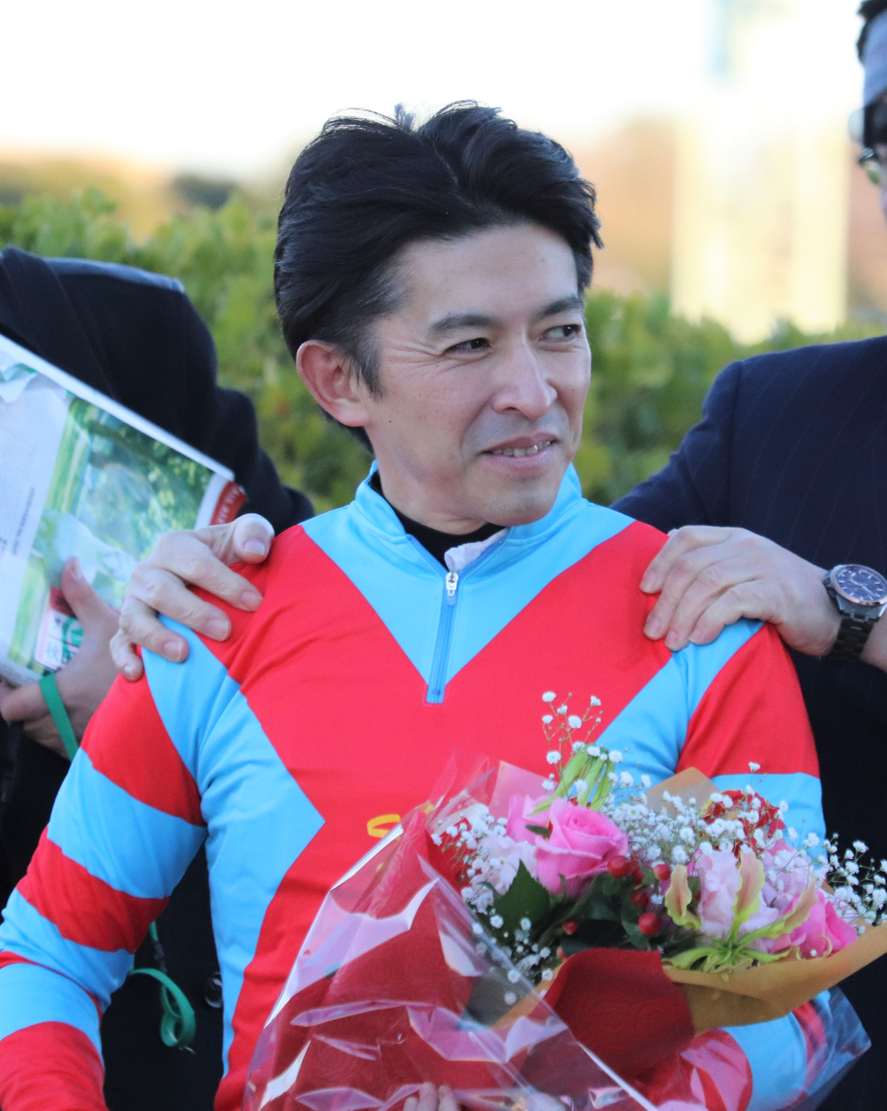 2019年のホープフルステークス。レース後の福永祐一